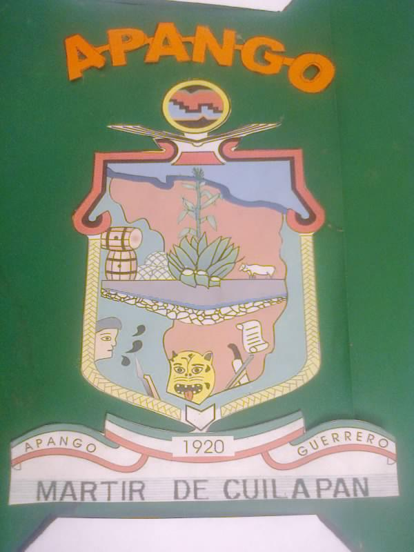 Escudo de Martir de Cuilapan